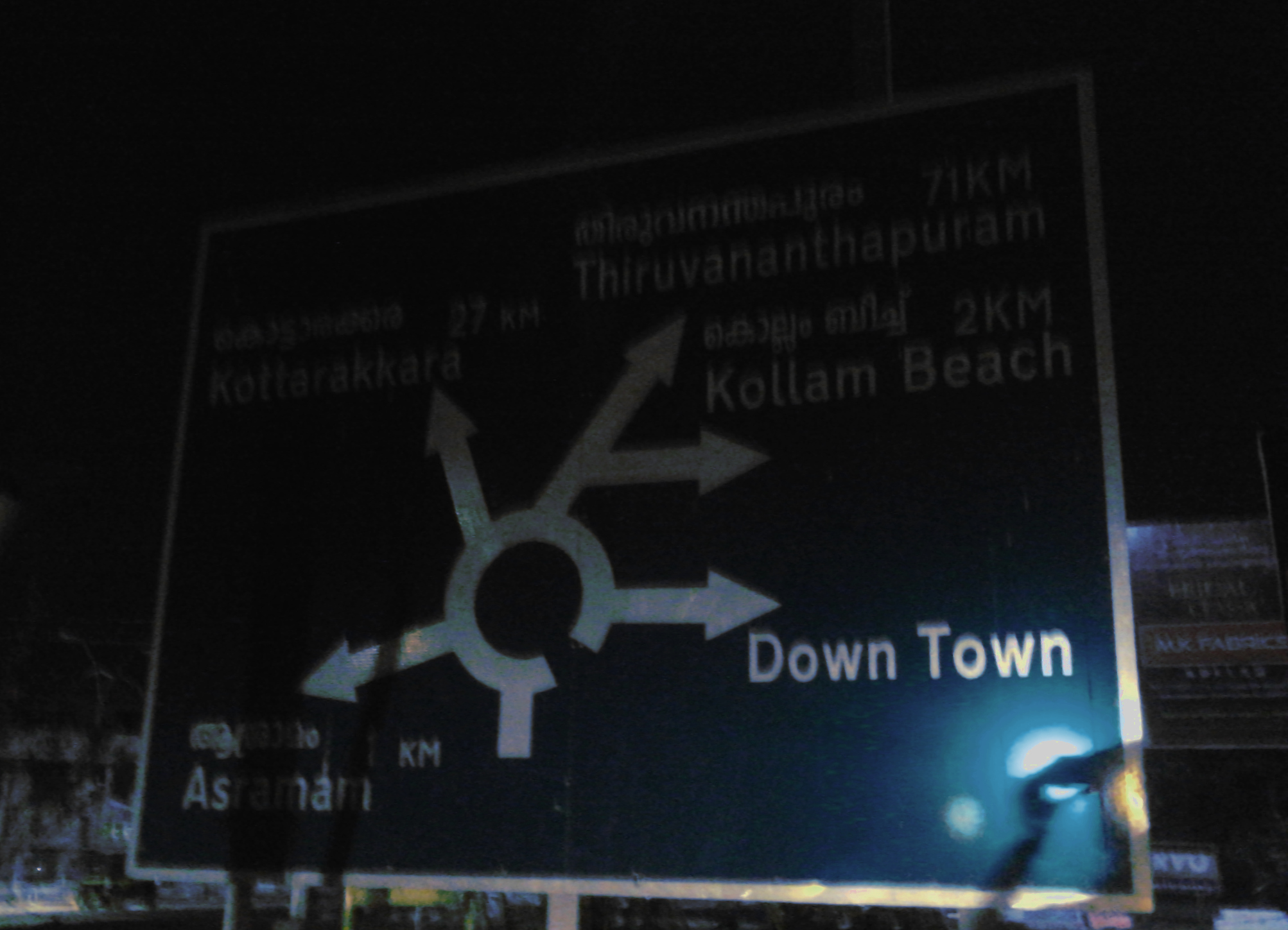 കൊല്ലം ചിന്നക്കടയിലെ ഒരു ദിശാസൂചി